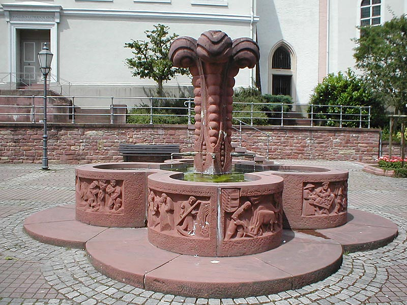 Brunnen vor dem Rathaus von Aglasterhausen